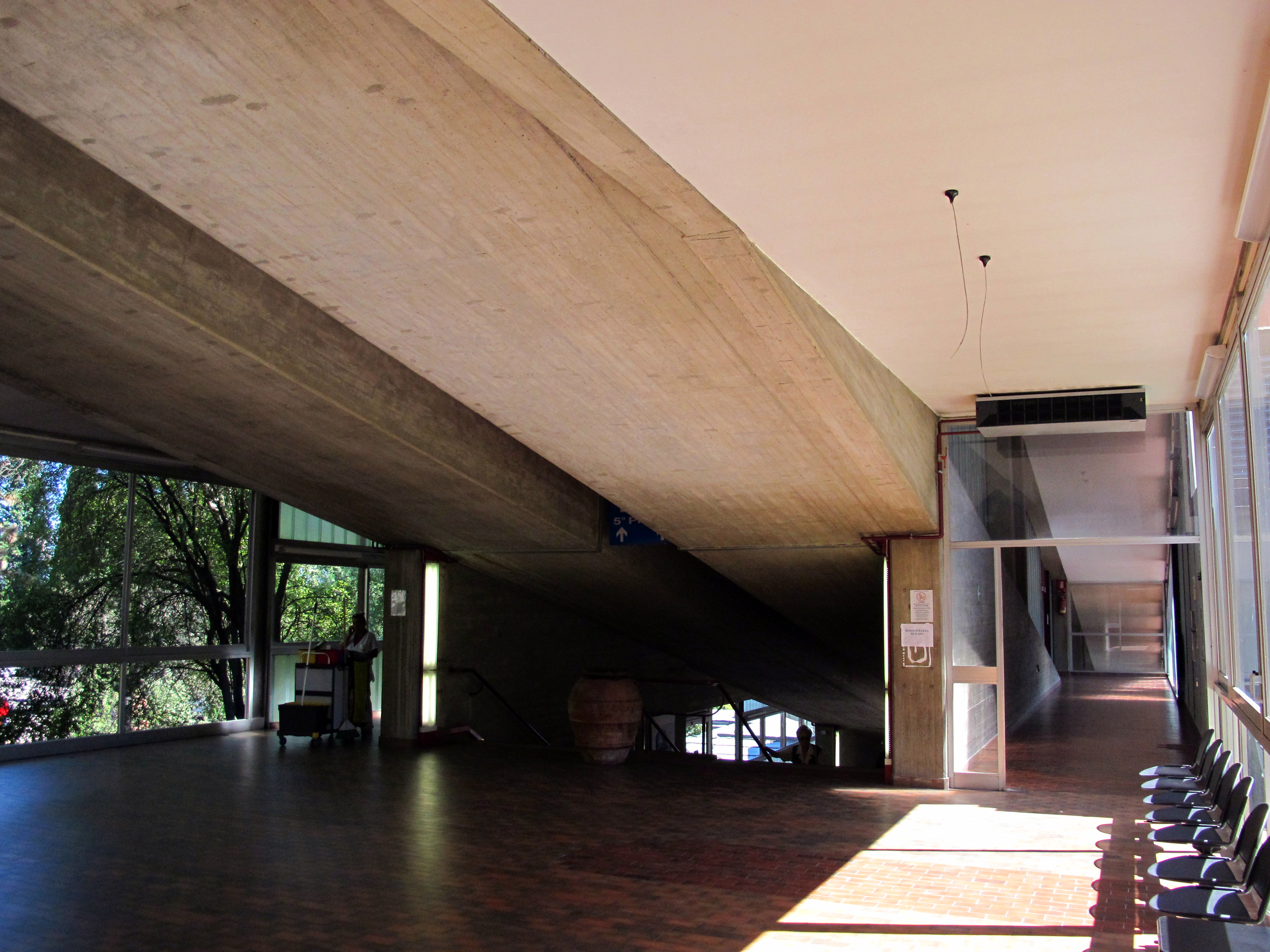 Ospedale Pietro Palagi, Florence